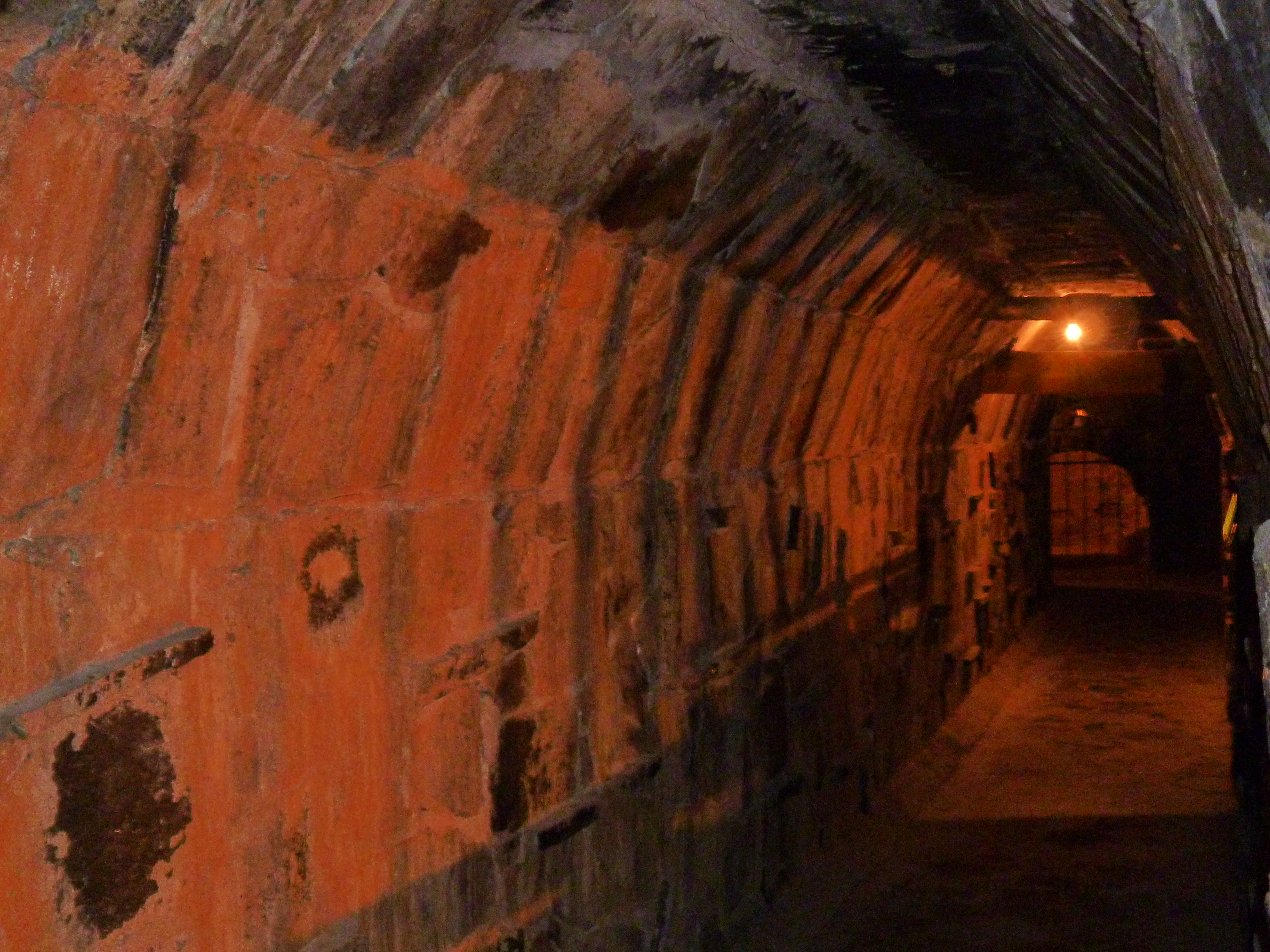 Mazmorras bajas ubicadas en el sótano en la Hacienda Vista Hermosa, ubicada en el pueblo que Tequesquitengo, Morelos, México.